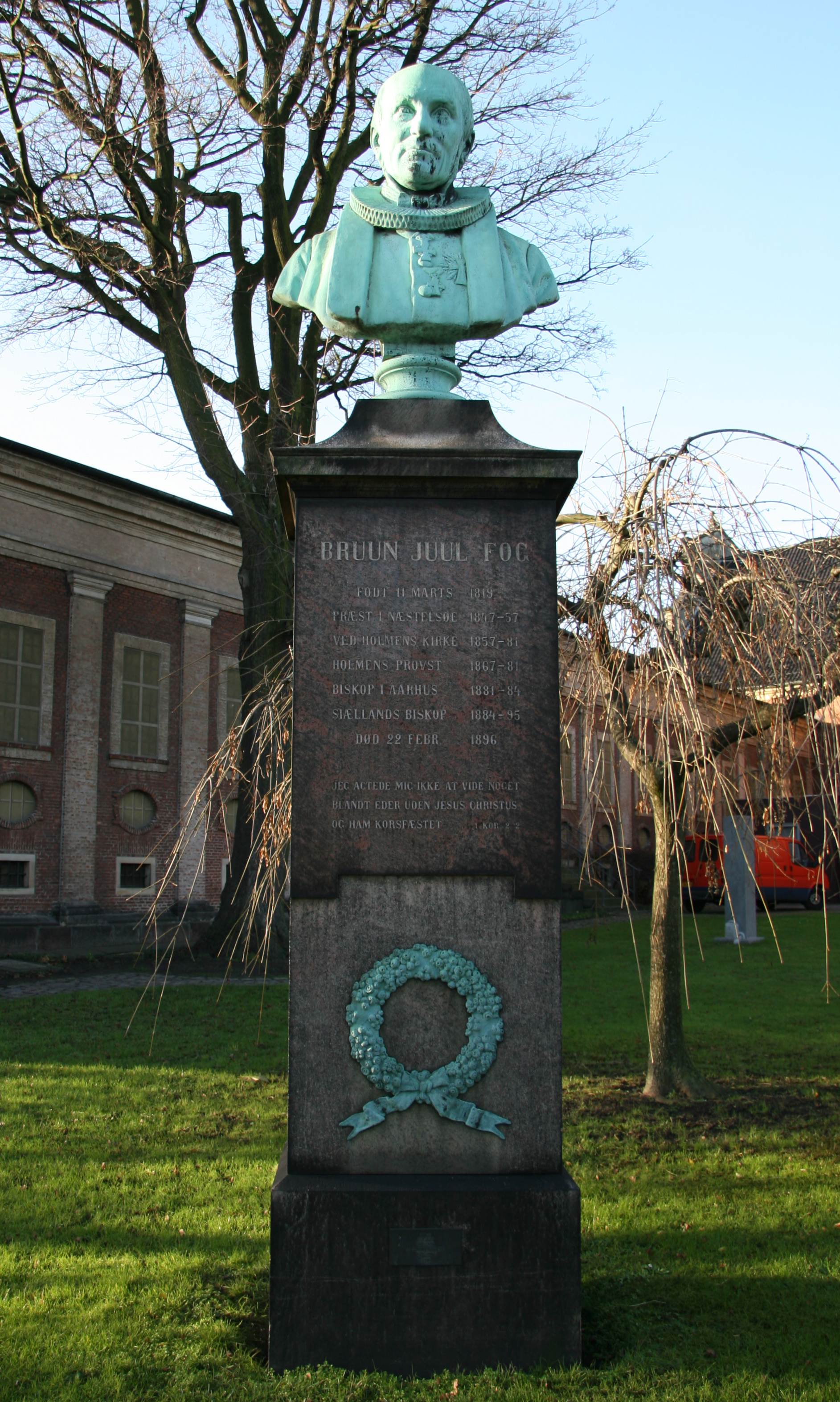 Holmens Kirke, Copenhagen, Denmark . Bruun Juul Fogs monument på store kirkegård.